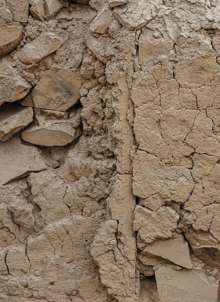 Detalle de muro y enlucido